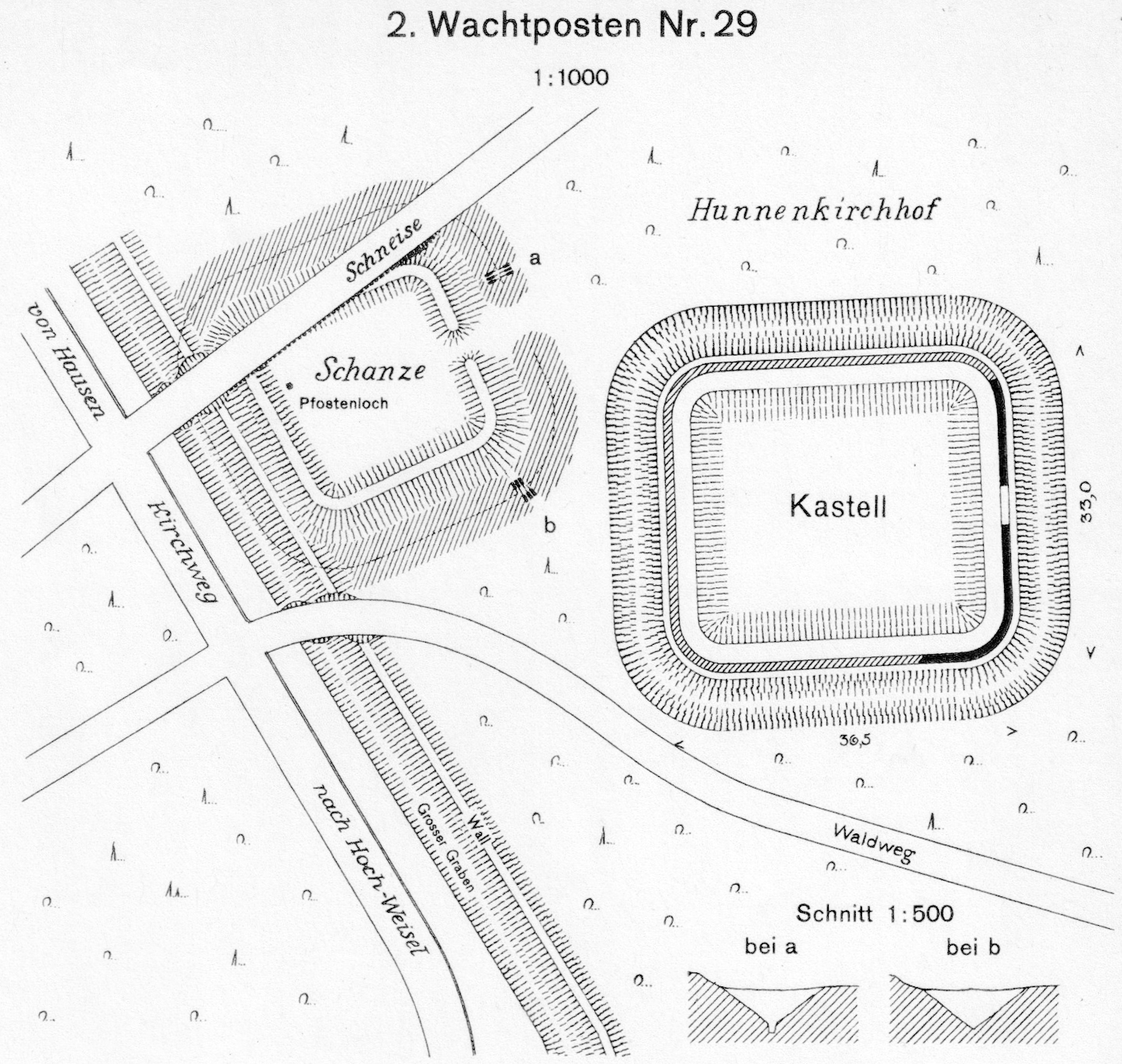 Grundriss der beiden Kleinkastelle "Hunnenkirchhof" bei Butzbach im Limeswerk (Ernst Fabricius, Felix Hettner, Oscar von Sarwey (Hrsg.): Der obergermanisch-raetische Limes des Roemerreiches/Abt. A, Bd. 2 Strecken 4 und 5 (Die Wetteraulinie vom Köpperner Tal bei der Saalburg bis zum Main bei Gross-Krotzenburg), 1936. Der Plan entstand nach Aussage im Text (S. 78) im Jahr 1896.